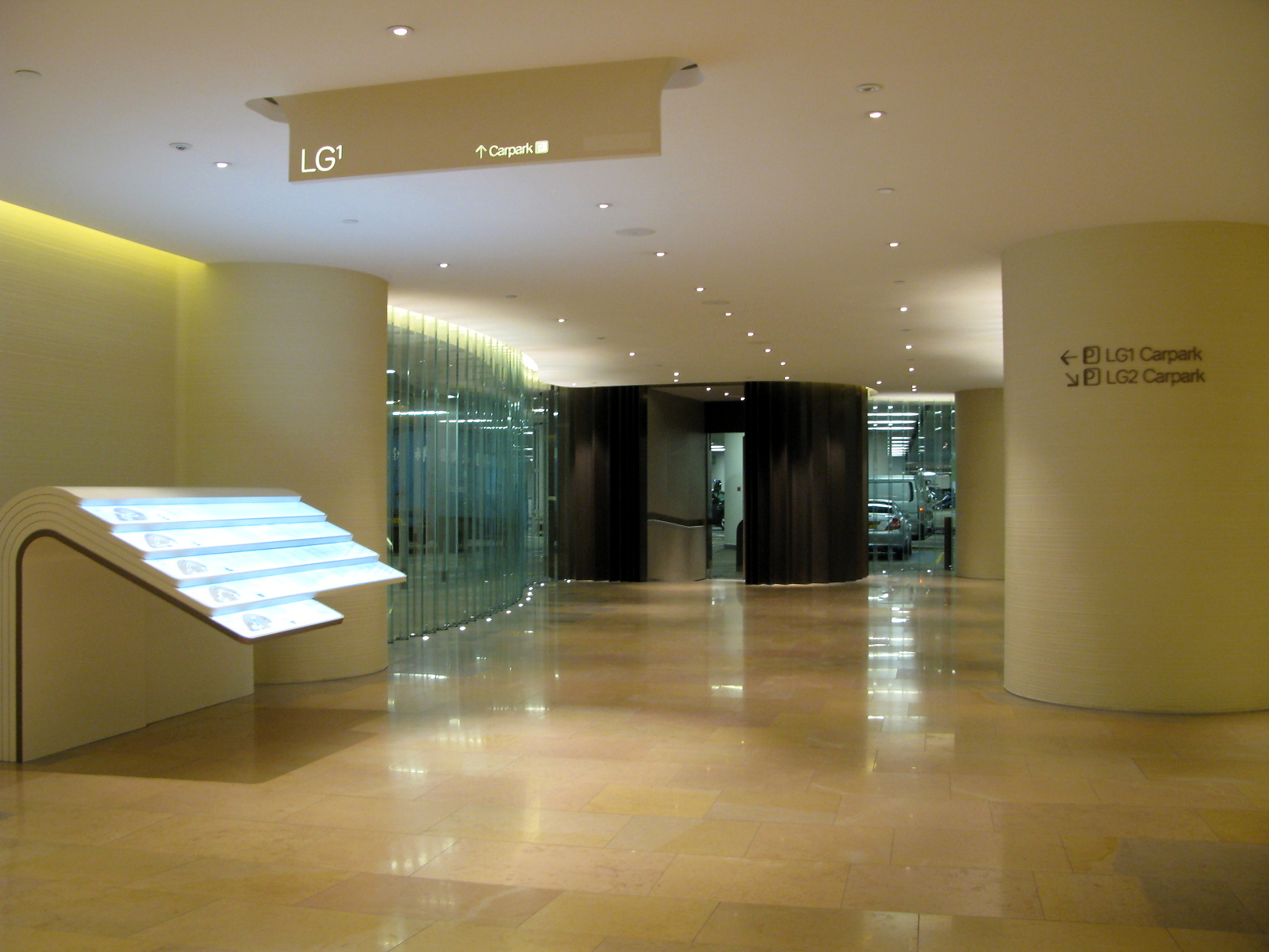 Pacific Place 太古廣場